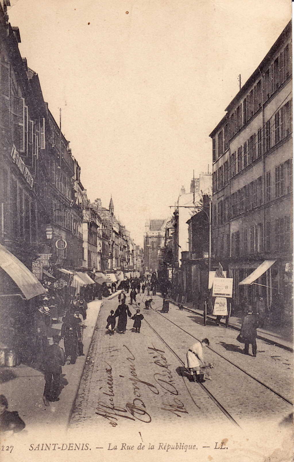 Carte postale ancienne éditée par LL n°127 :SAINT-DENIS - La Rue de la République